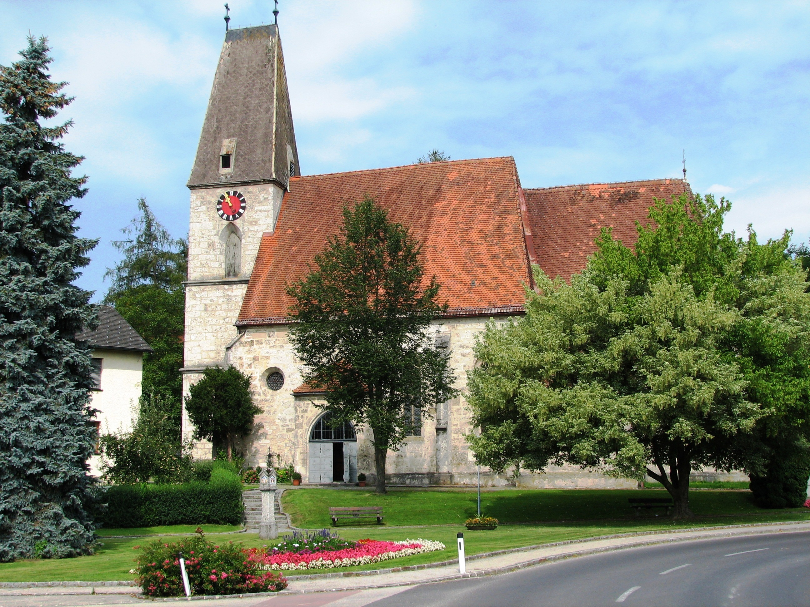 Ortsansicht der Pfarrkirche Sipbachzell